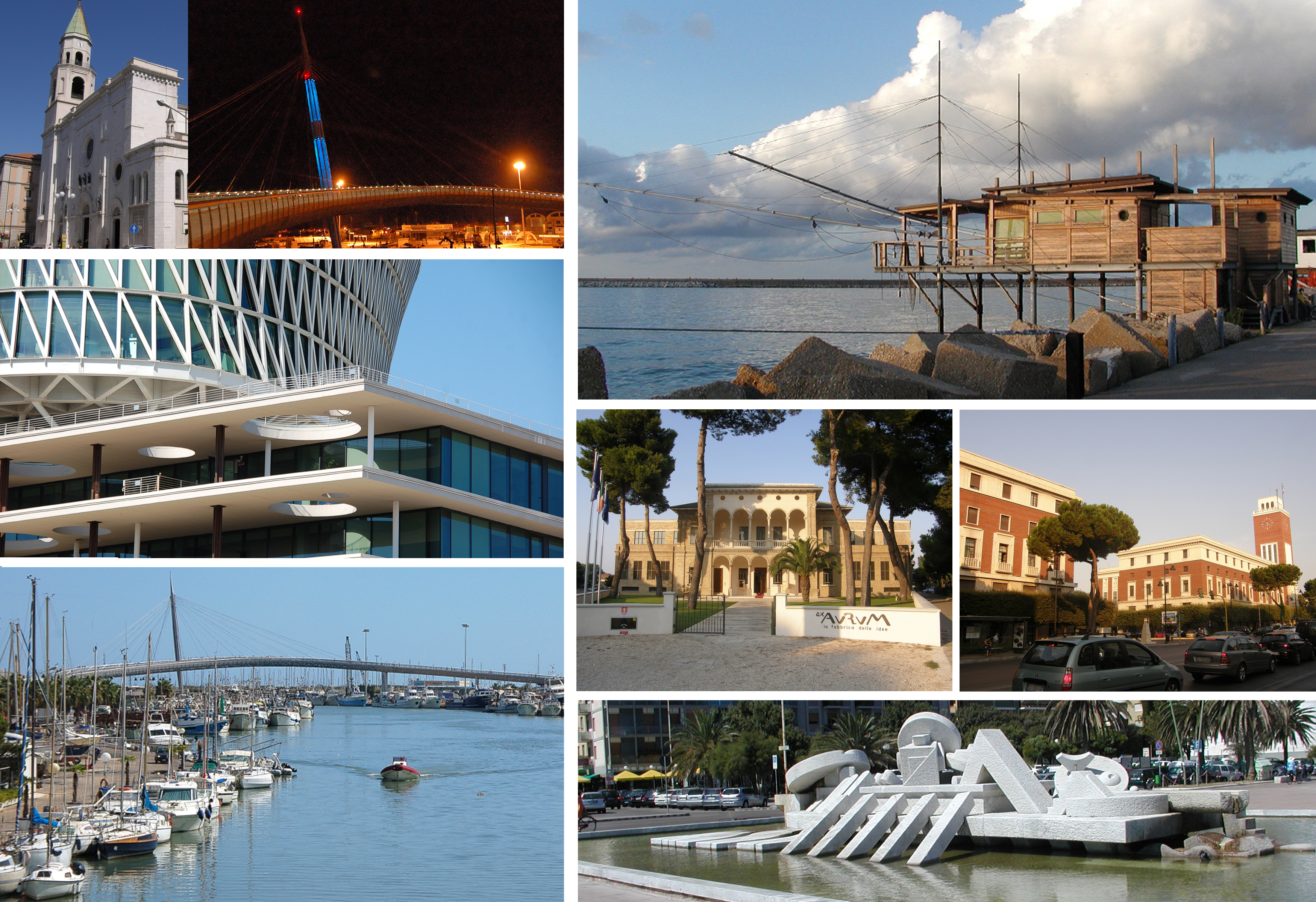 Collage di immagini Commons per la voce Pescara